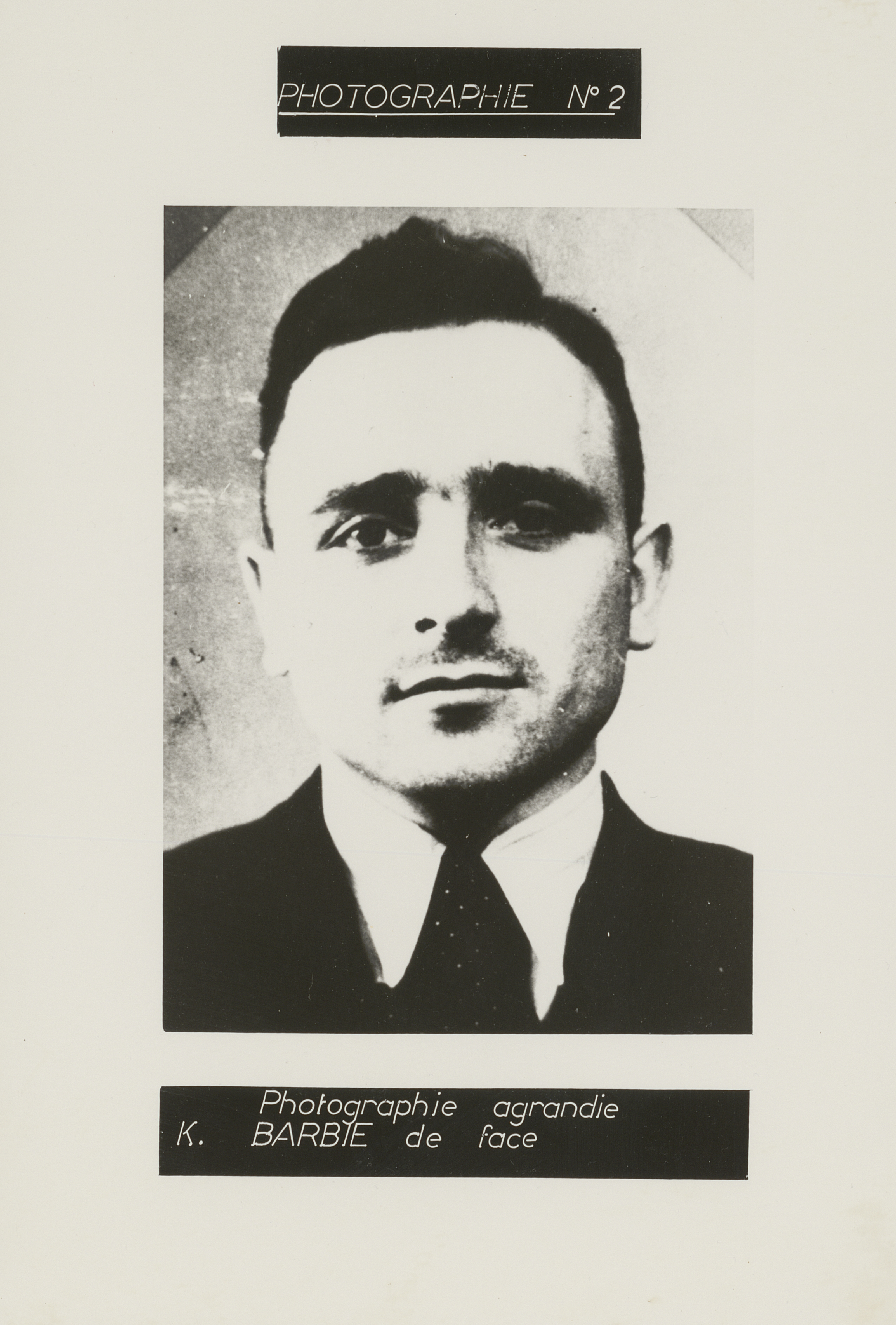 ADRML, 4544 W 23